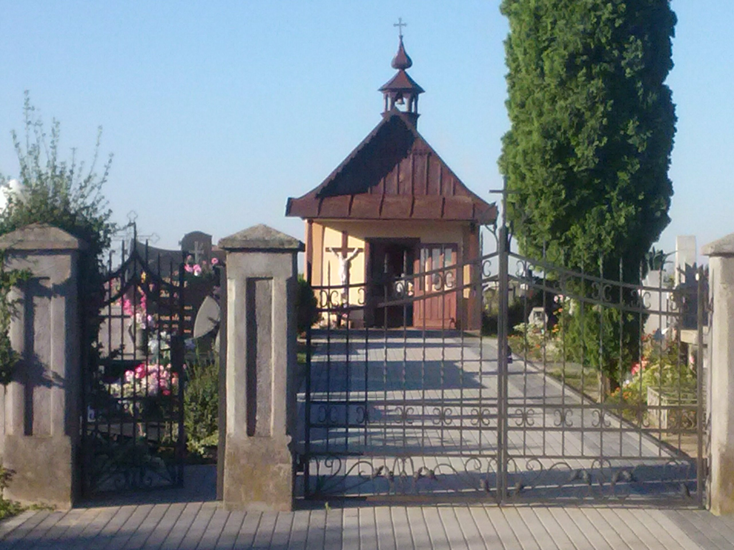 Cmentarz parafialny w Wólce Pełkińskiej